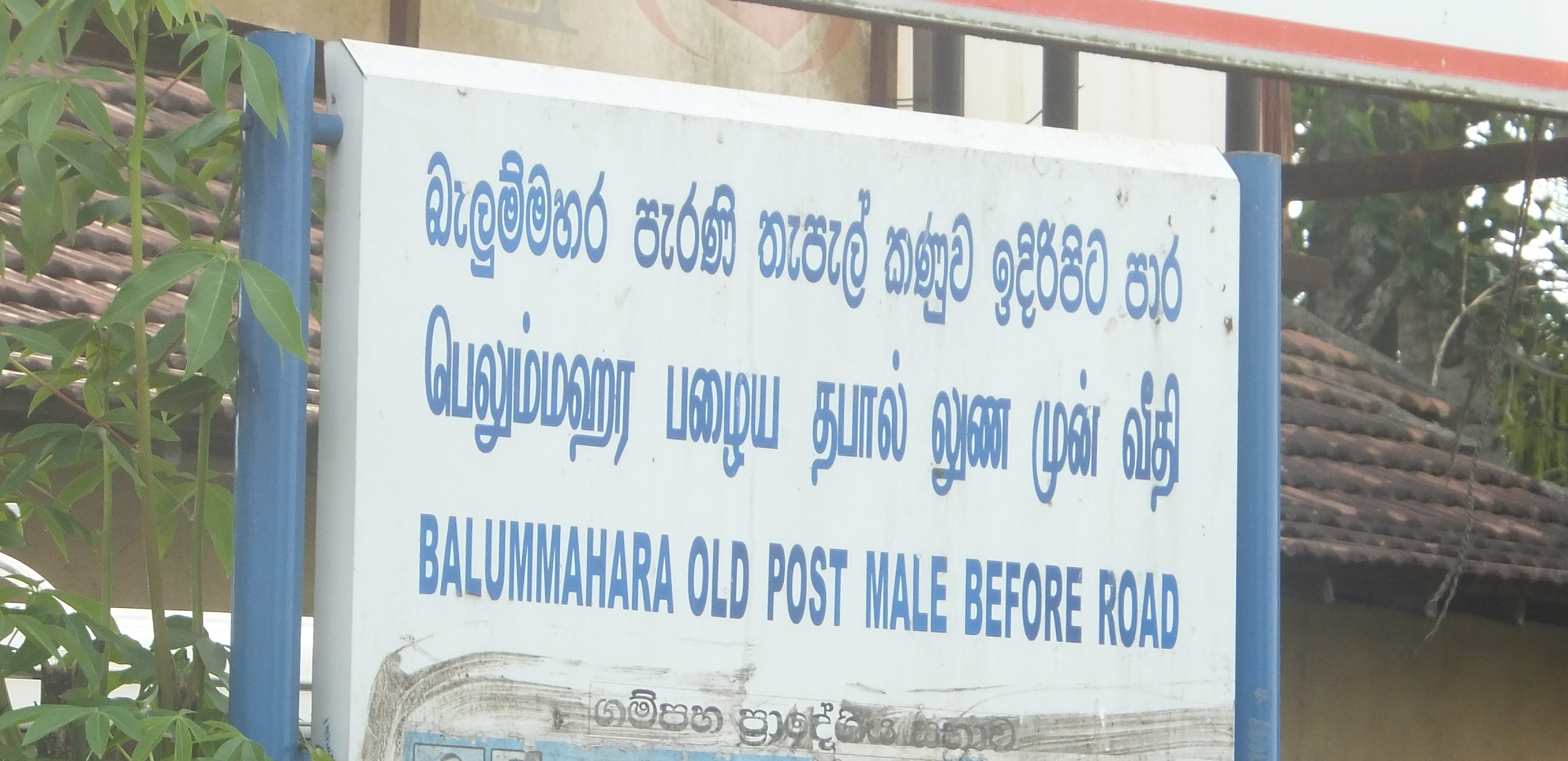 සිංහල: බැලුම්මහර පැරණි තැපැල් කණුව ඉදිරිපිට පාරේ නාම පුවරුව ක්‍රි.ව. 2013දී